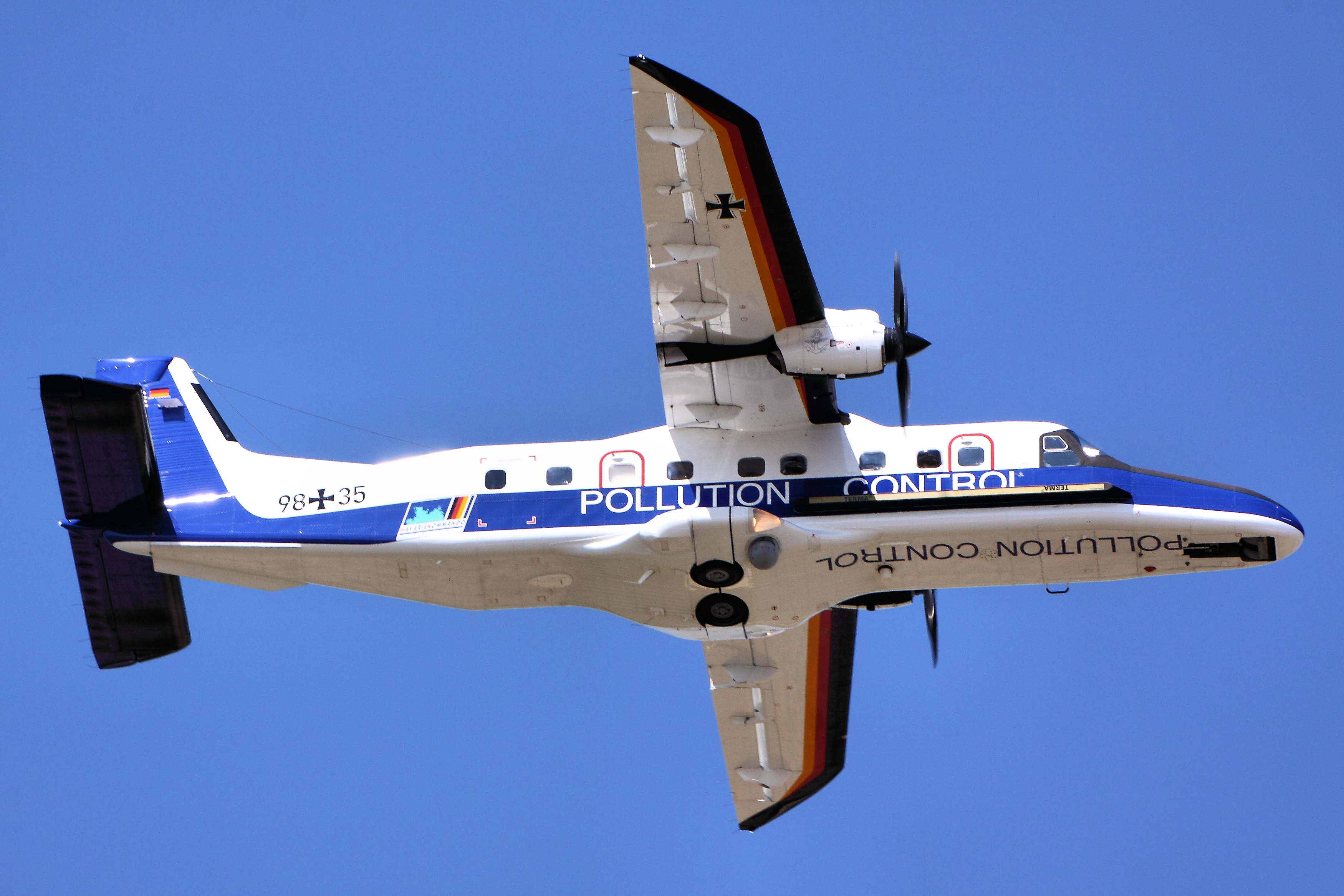 Dornier Do-228 - RIAT 2013